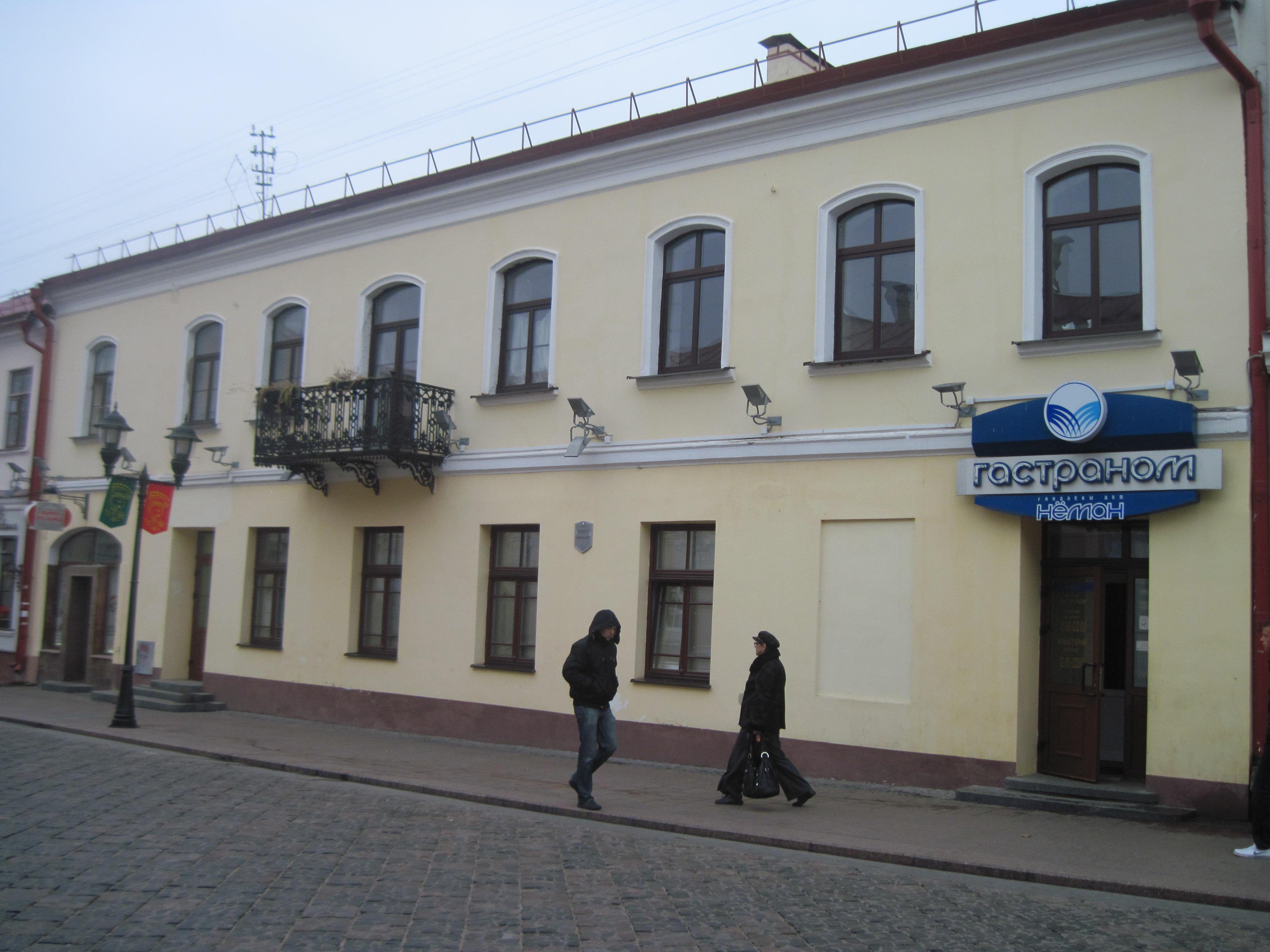 Беларуская (тарашкевіца): Фотаздымак дома №5 па вуліцы Савецкай у Гродне